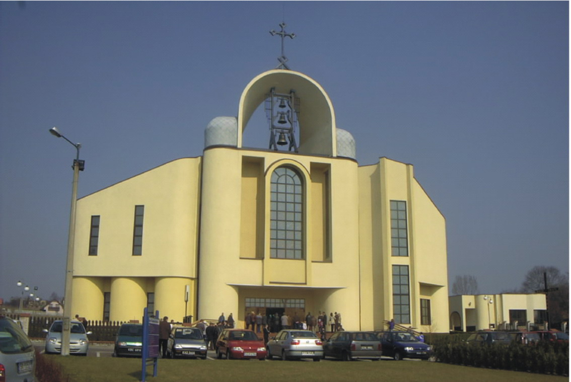 Kościół parafialny Trójcy Przenajświętszej w Kostuchnie. Rok 2004. (Zdjęcie własne). Budowę Kościoła zakończono we wrześniu 1995 roku a poświęcenia dokonano 7 października 1995 roku